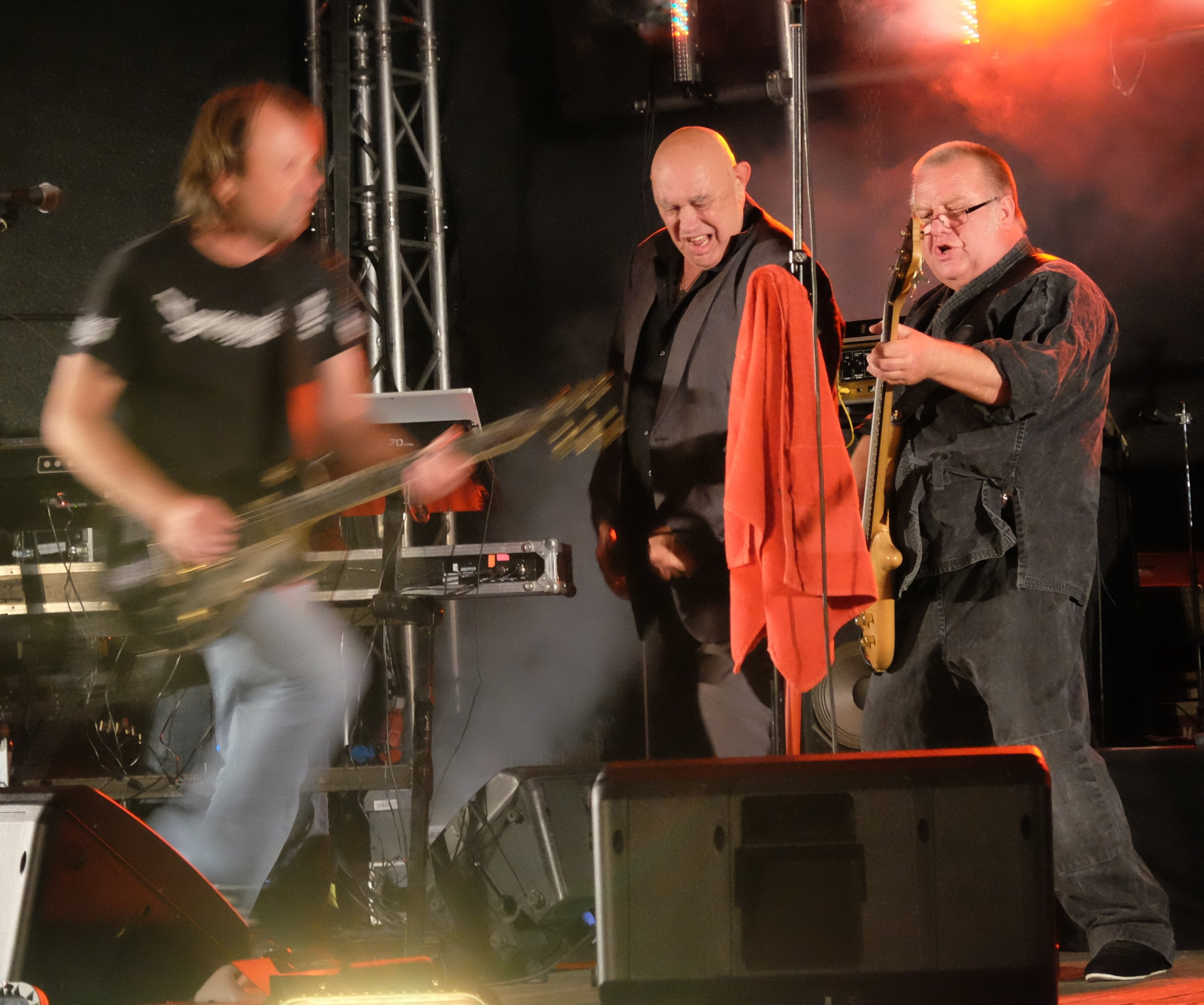 Stier Münster 2. September 2017